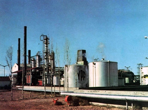 Destilería de Plaza Huincul.